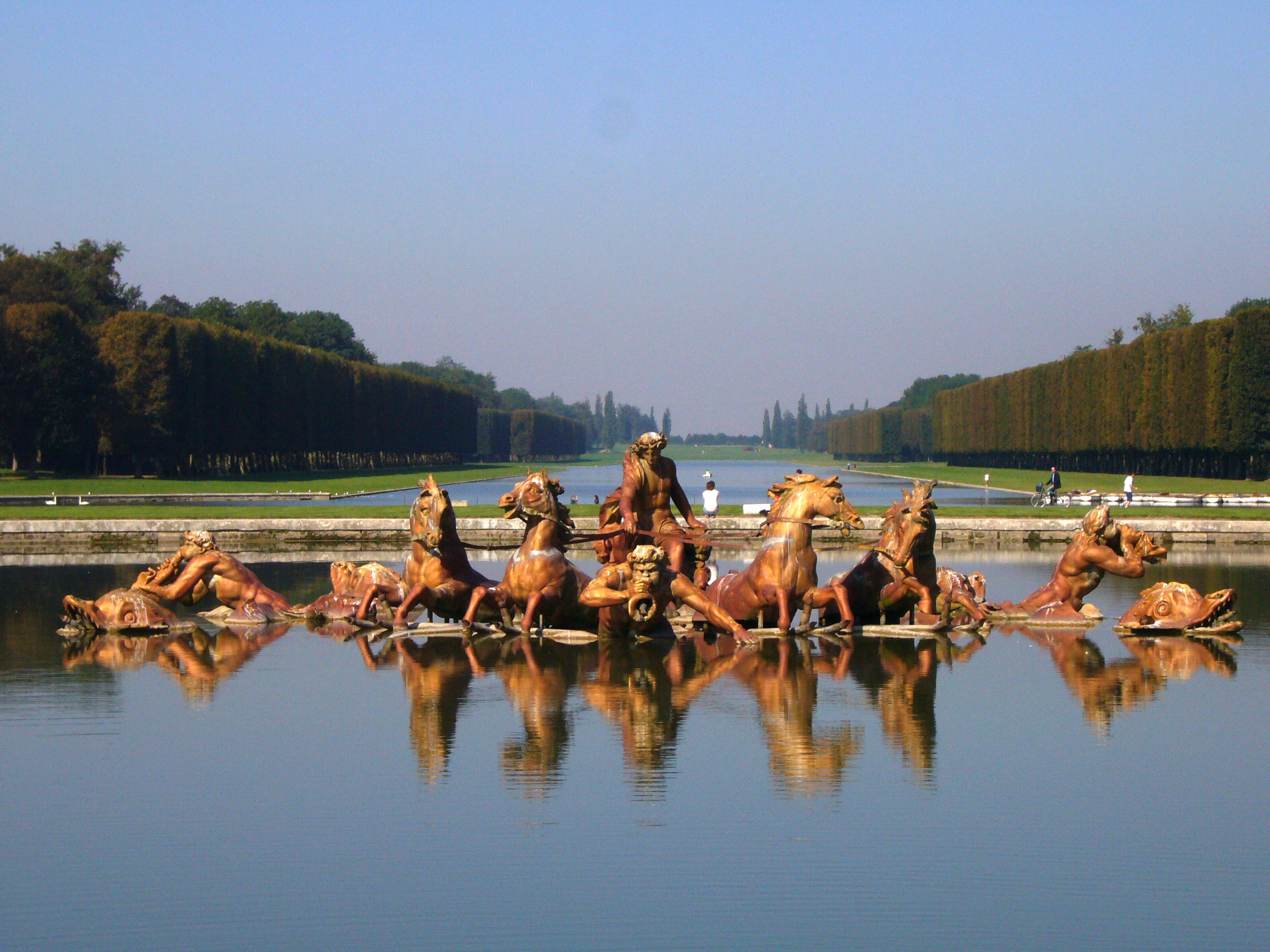 Bassin du char d'Apollon